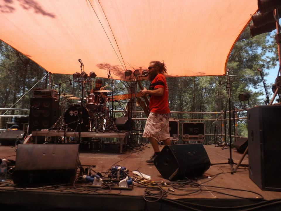 אייל תלמודי רוקד על הבמה 2015